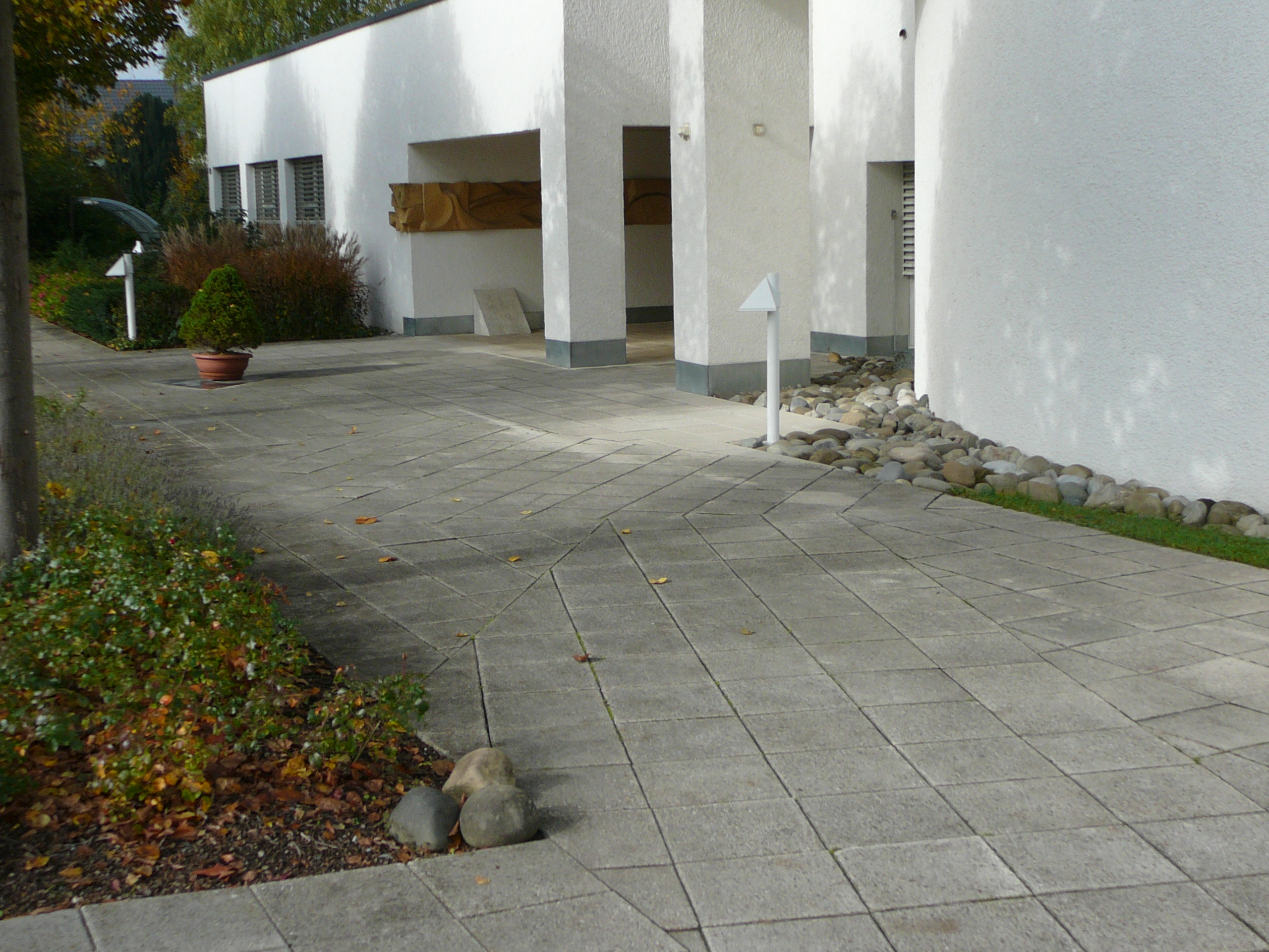 Römisch-katholische Auferstehungskirche St. Maria Magdalena Rafz, Plattenweg mit Konzept von Alois Spichtig